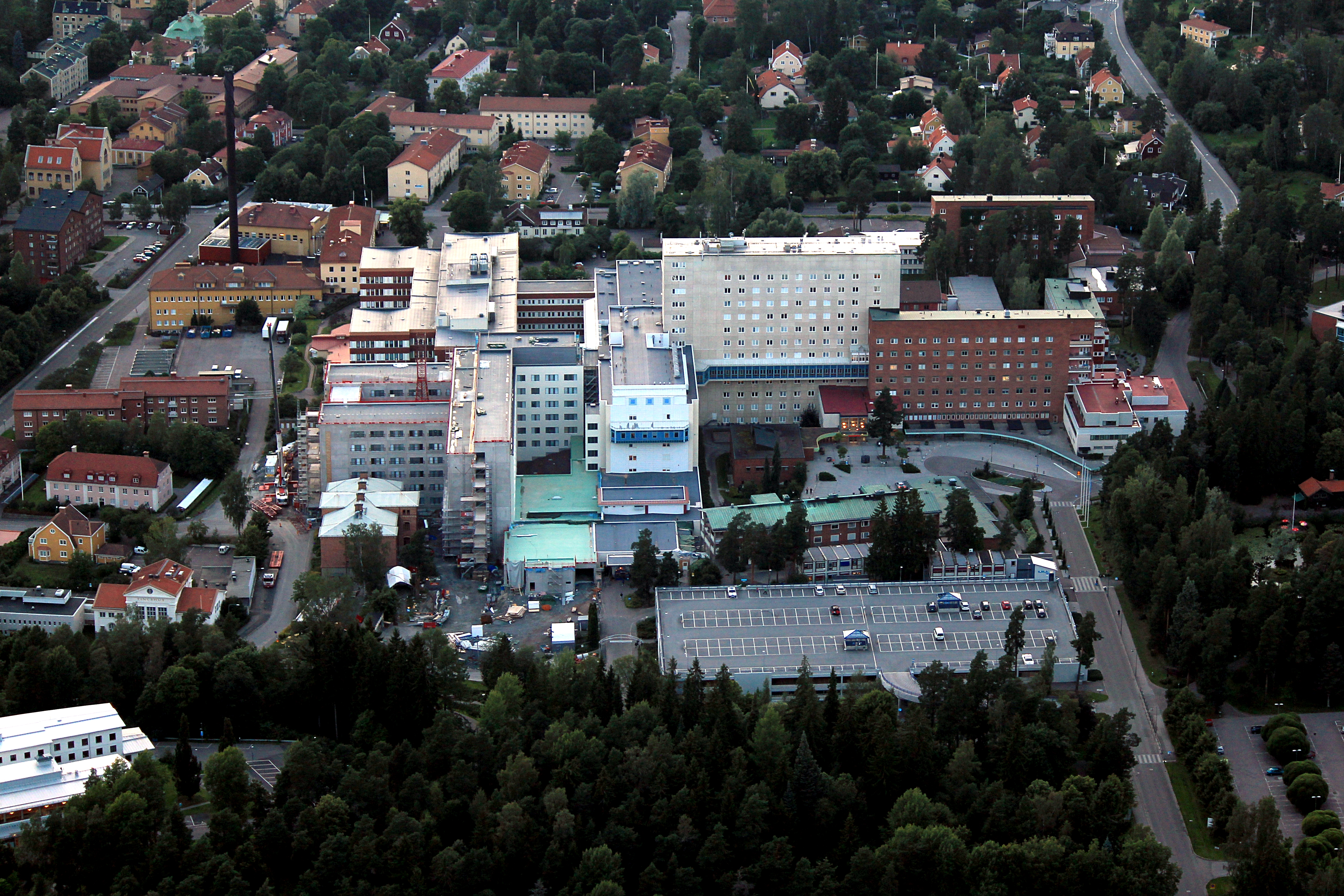 Flygfoto över Falu lasarett, Falun, Dalarnas län, Sverige This aerial photograph has been approved for publishing by the Swedish Armed Forces with the ID: FMTM 10 830:11043 This tag does not indicate the copyright status of the attached work. A normal copyright tag is still required. See Commons:Licensing.